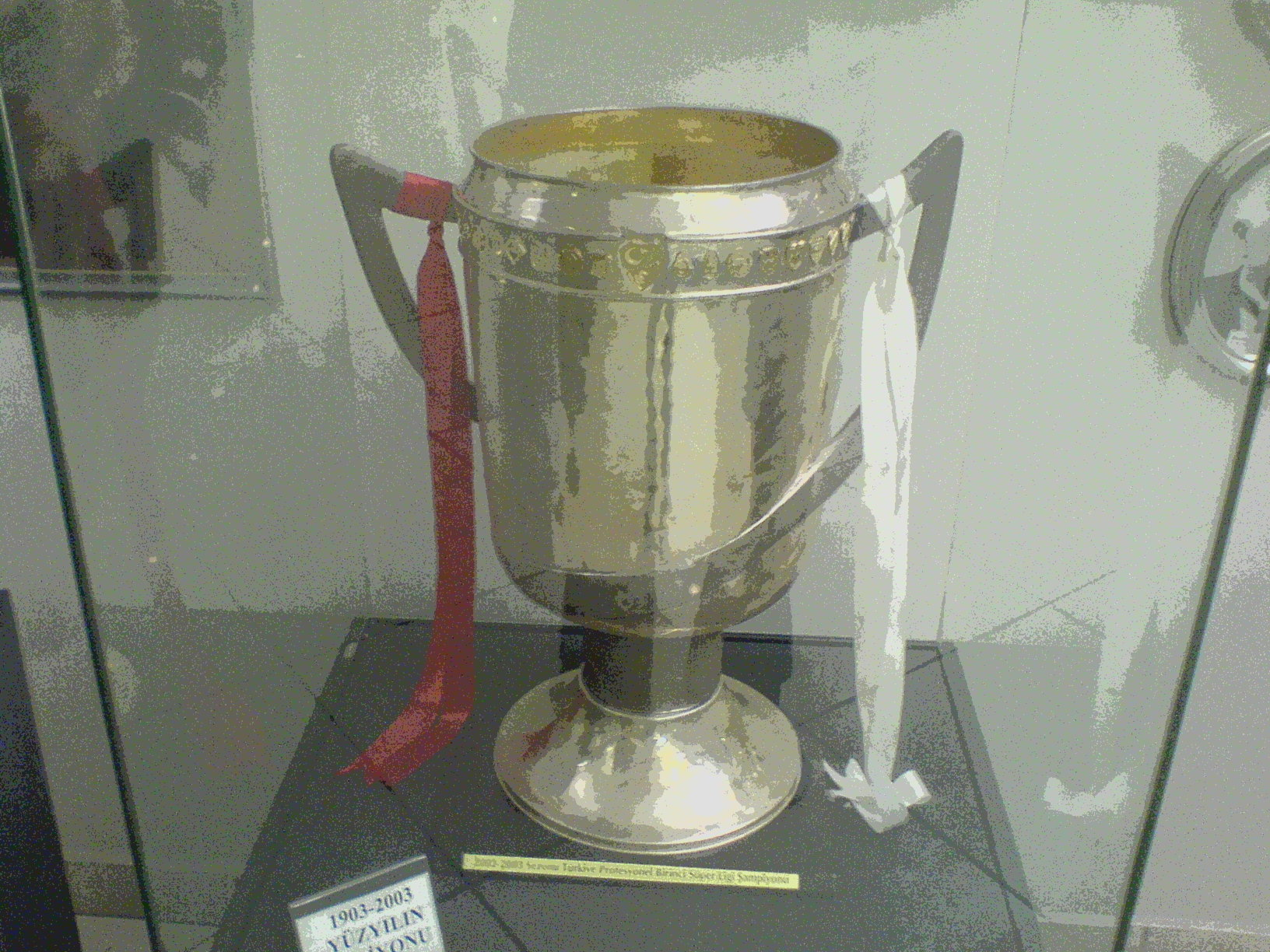 Yüzüncü yılda alınan şampiyonluk kupası. Beşiktaş muzesinden.